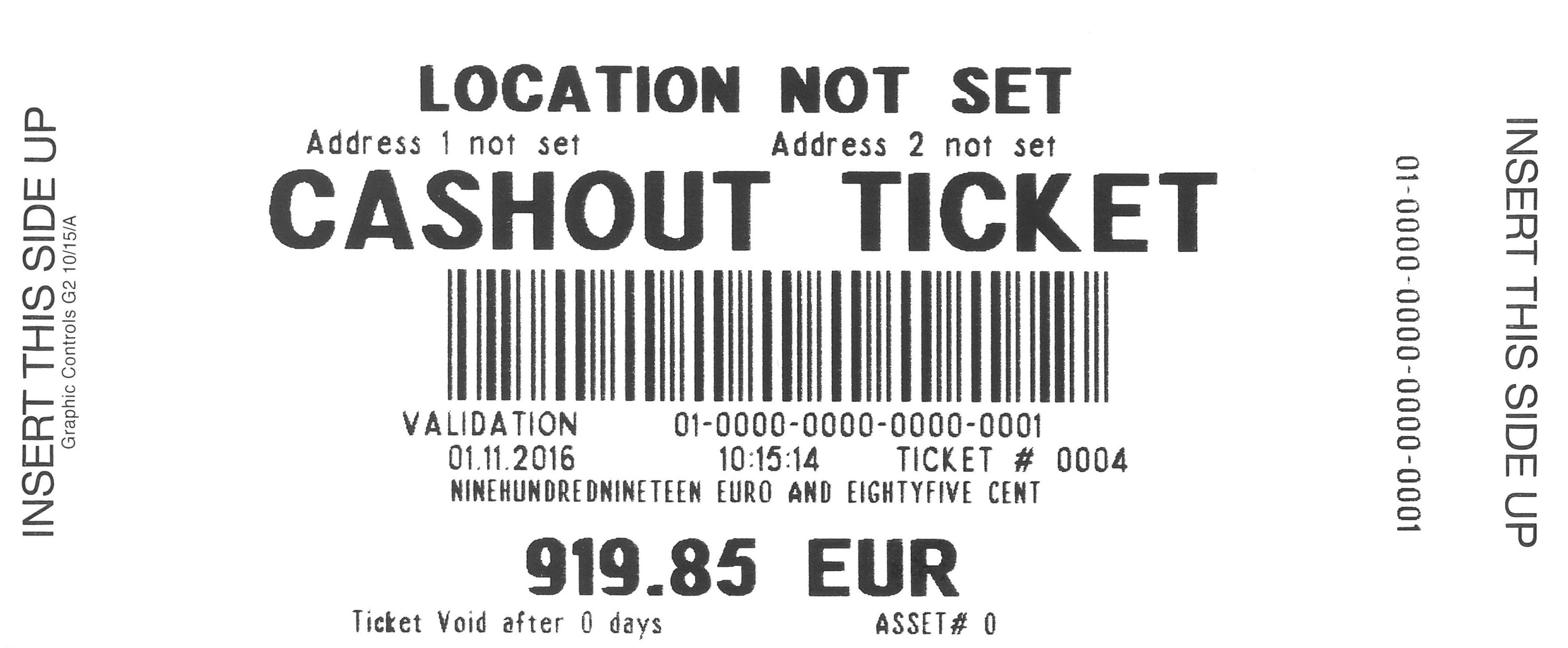 Casino cashout ticket The depicted text is ineligible for copyright and therefore in the public domain, because it is not a “literary work” or other protected type in sense of the local copyright law. Facts, data, and unoriginal information which is common property without sufficiently creative authorship in a general typeface or basic handwriting, and simple geometric shapes are not protected by copyright. This tag does not generally apply to all images of texts. Particular countries can have different legal definition of the “literary work” as the subject of copyright and different court's interpretation practices. Some countries protect almost every written work, while other countries protect distinctively artistic or scientific texts and databases only. Extent of creativeness, function and length of the text can be relevant. The copyright protection can be limited to the literary form – the included information itself can be excluded from protection.